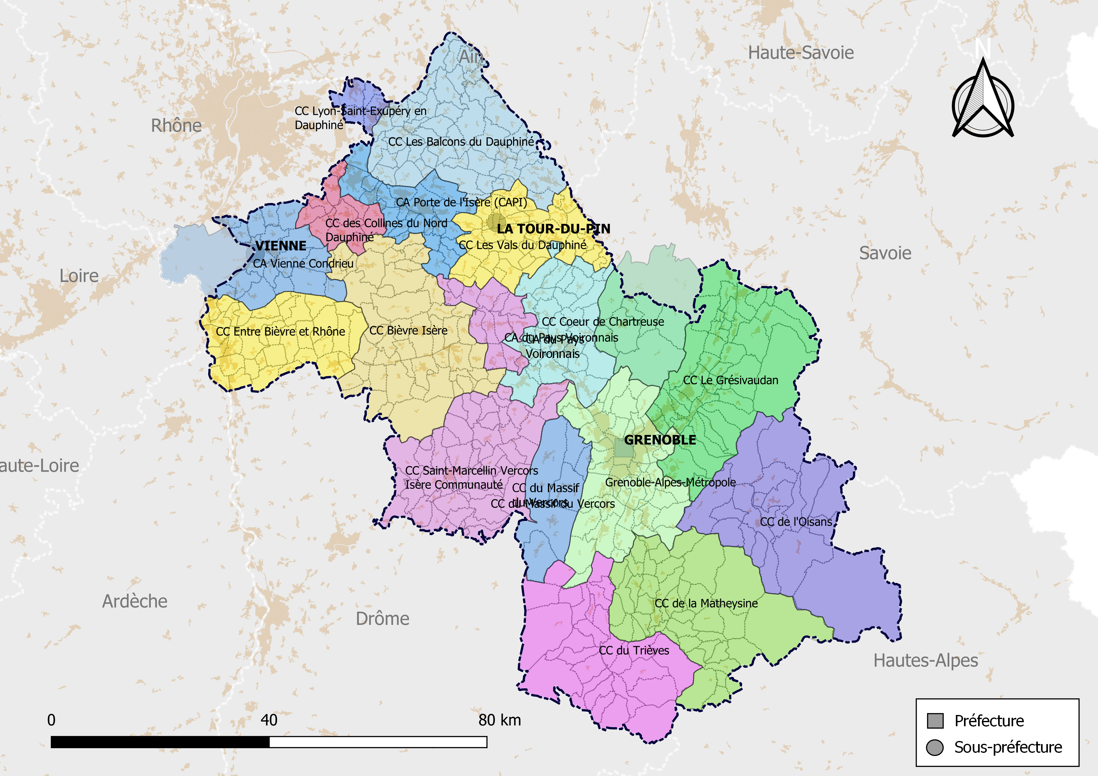 Carte des intercommunalités du département de l'Isère, France. Composition au 1er janvier 2019.